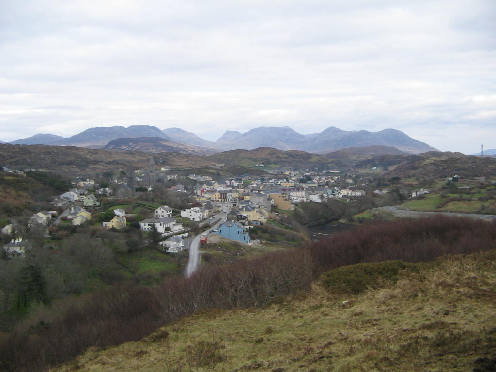 Photo prise en Avril 2006. Je certifie etre l'auteur de cette photo (appareil photo utilise: Canon PowerShot A400) Gronico 13:44, 15 August 2006 (UTC)